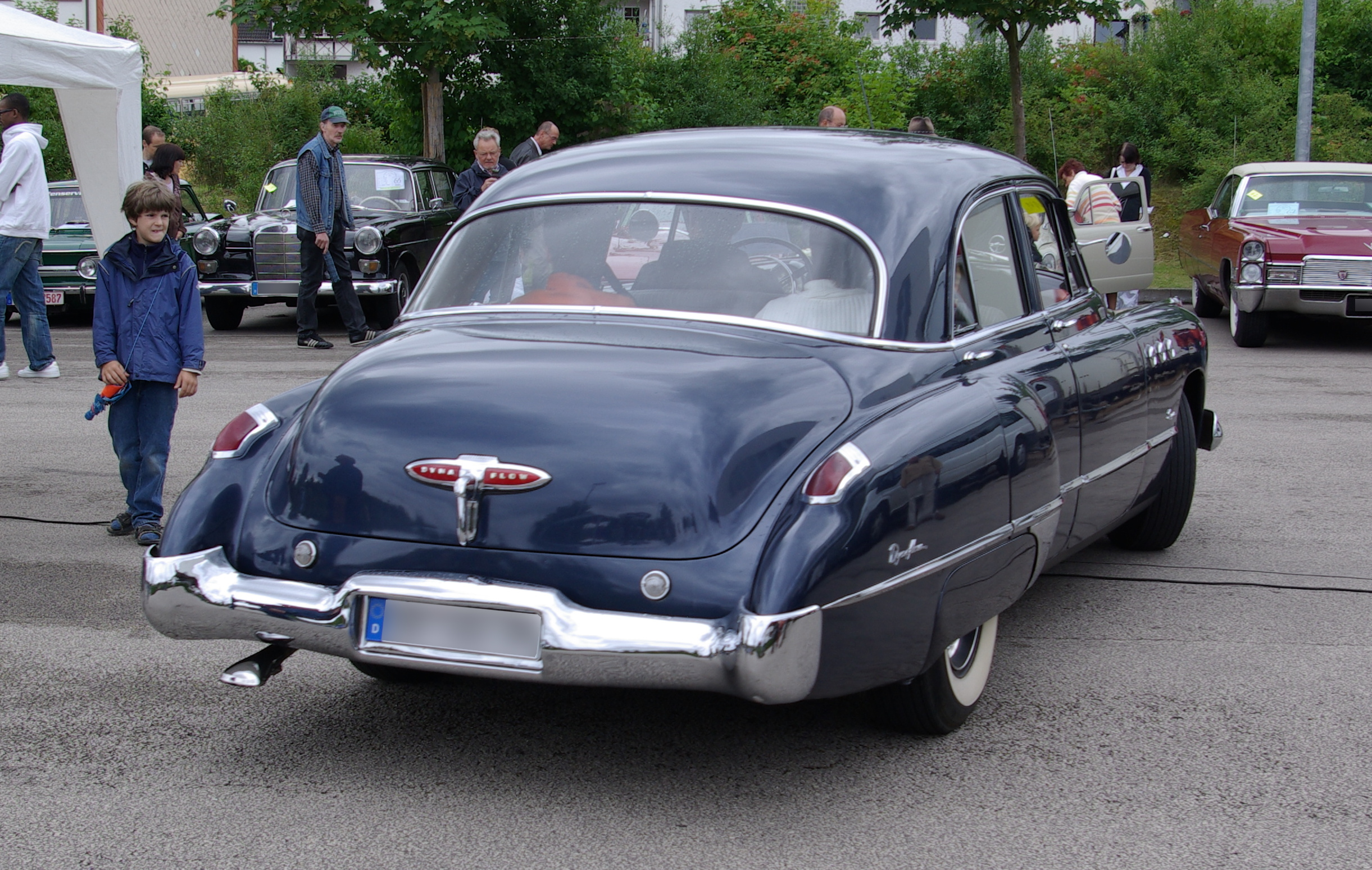 Buick Super Serie 50, Baujahr 1949, aufgenommen bei / photographed at "25. Internationales Konzer Oldtimer-Treffen", 19. Juli 2009